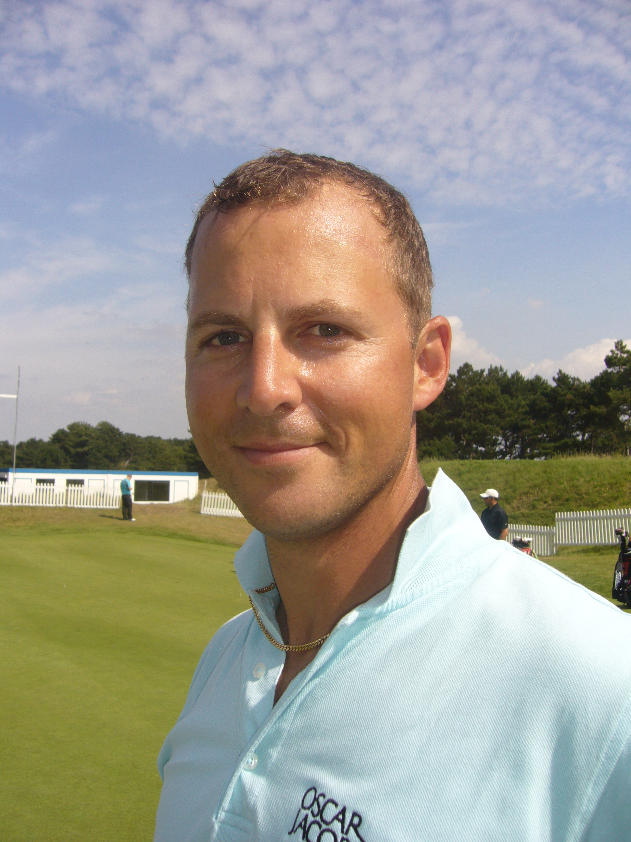 Niclas Fasth op KLM Open 2009